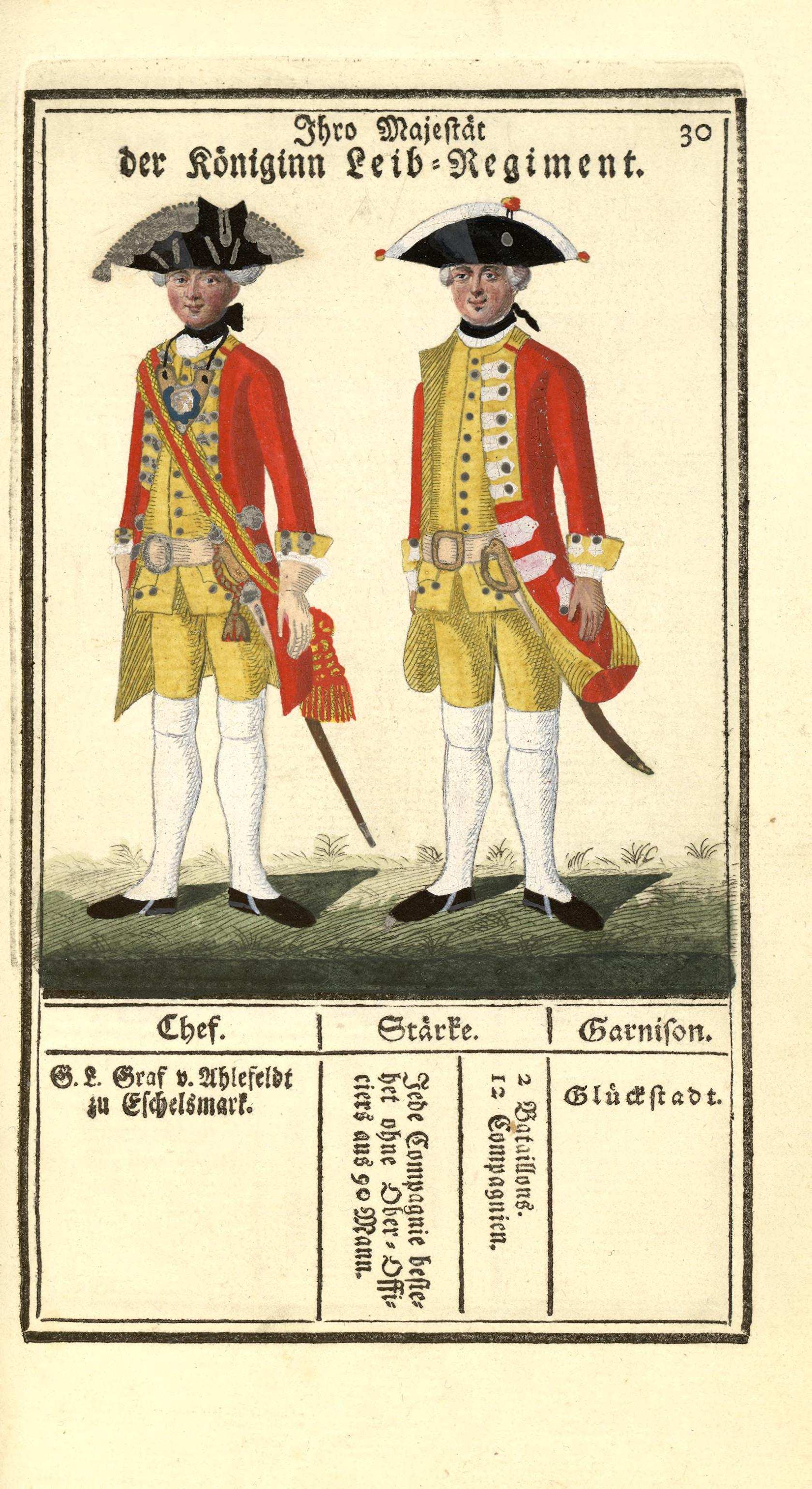 Illustrasjon hentet fra boken "Vorstellung der sämtlichen Königl. Dänischen Armee" av Bertram, Carl og utgitt av Carl Bertram (dk, 1763)